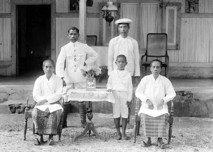 Negatief. Er was in Indië vanaf 1911 een Burgerlijk Geneeskundige Dienst (BGD), later omgedoopt tot Dienst voor de Volksgezondheid (DVG). Op afgelegen plaatsen was er echter niet altijd een vestiging van deze diensten. Aangezien afgelegen plaatsen ook plaatsen met veel 'heidenen' waren, dat is mensen die noch christen noch moslim waren, kon men zending en/of missie hier wel vinden. In veel gevallen werd er door zending of missie tevens onderwijs gegeven en een ziekenhuis of polikliniek gedreven. In de polikliniek op de foto, onderdeel van het zendings-hulpziekenhuis, werden ook 'beren' (kettinggangers) en andere gestraften opgevangen. (P. Boomgaard, 2001). Boeroe. Polikliniek te Leksoela, havenplaats Z-Boeroe, in het Zendelinghulp ziekenhuis aldaar. Onder de patienten, ook de gestraften en kettinggangers van het Gouvernement.